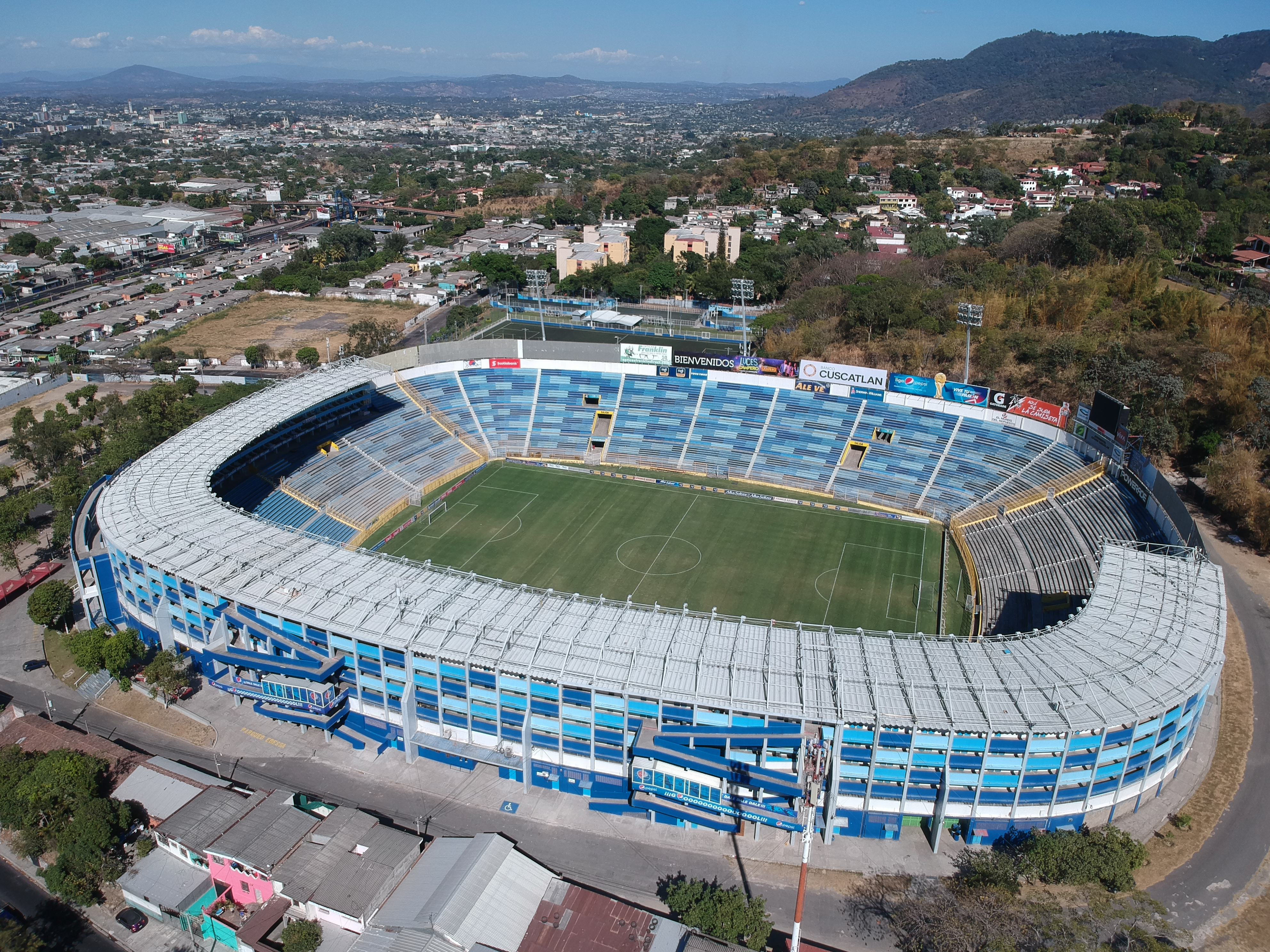 Tomas con Drone propio a una altura de 100 metros